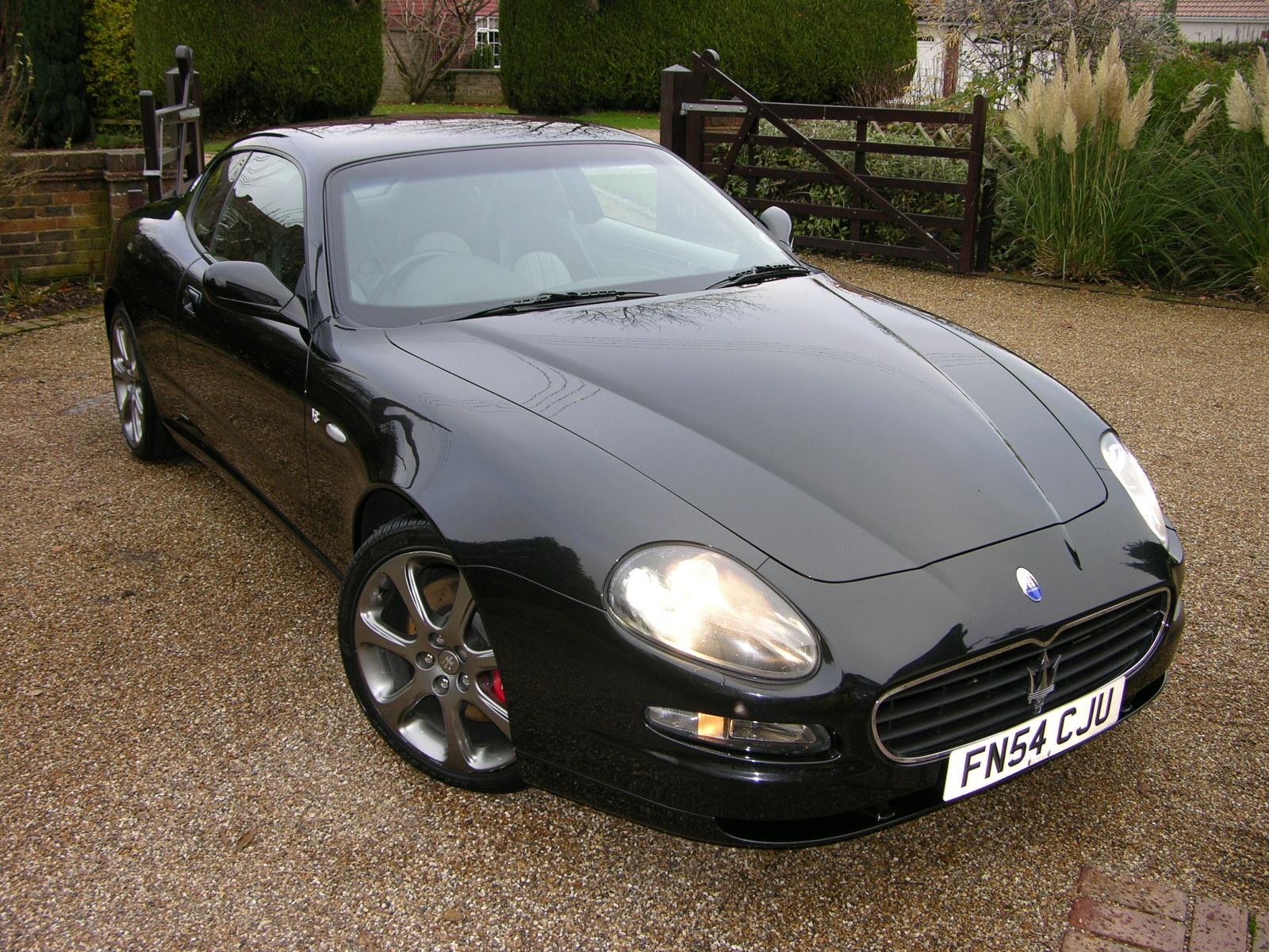 2005 Maserati 4200 GT